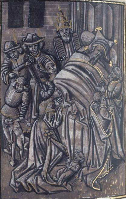 Saint Sylvestre au chevet de Constantin